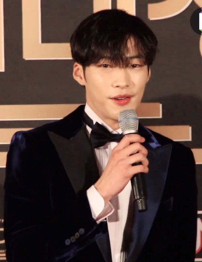 2017 KBS연기대상 레드카펫 '매드독' 우도환